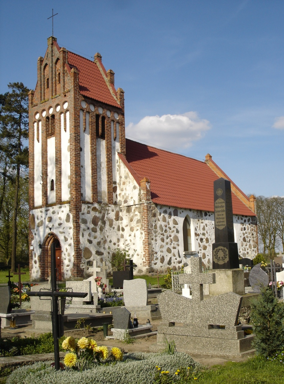 Małkocin - kościół filialny p.w. św. Józefa (zabytek 361)